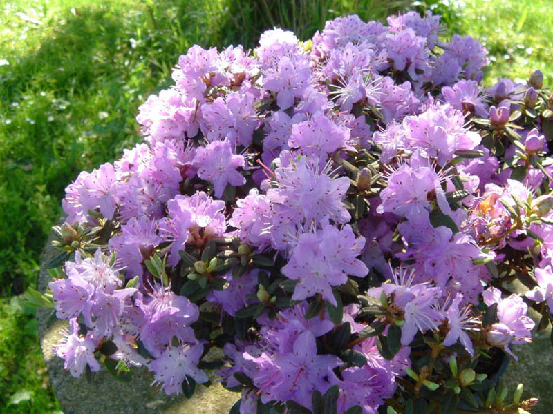 Rhododendron impeditum